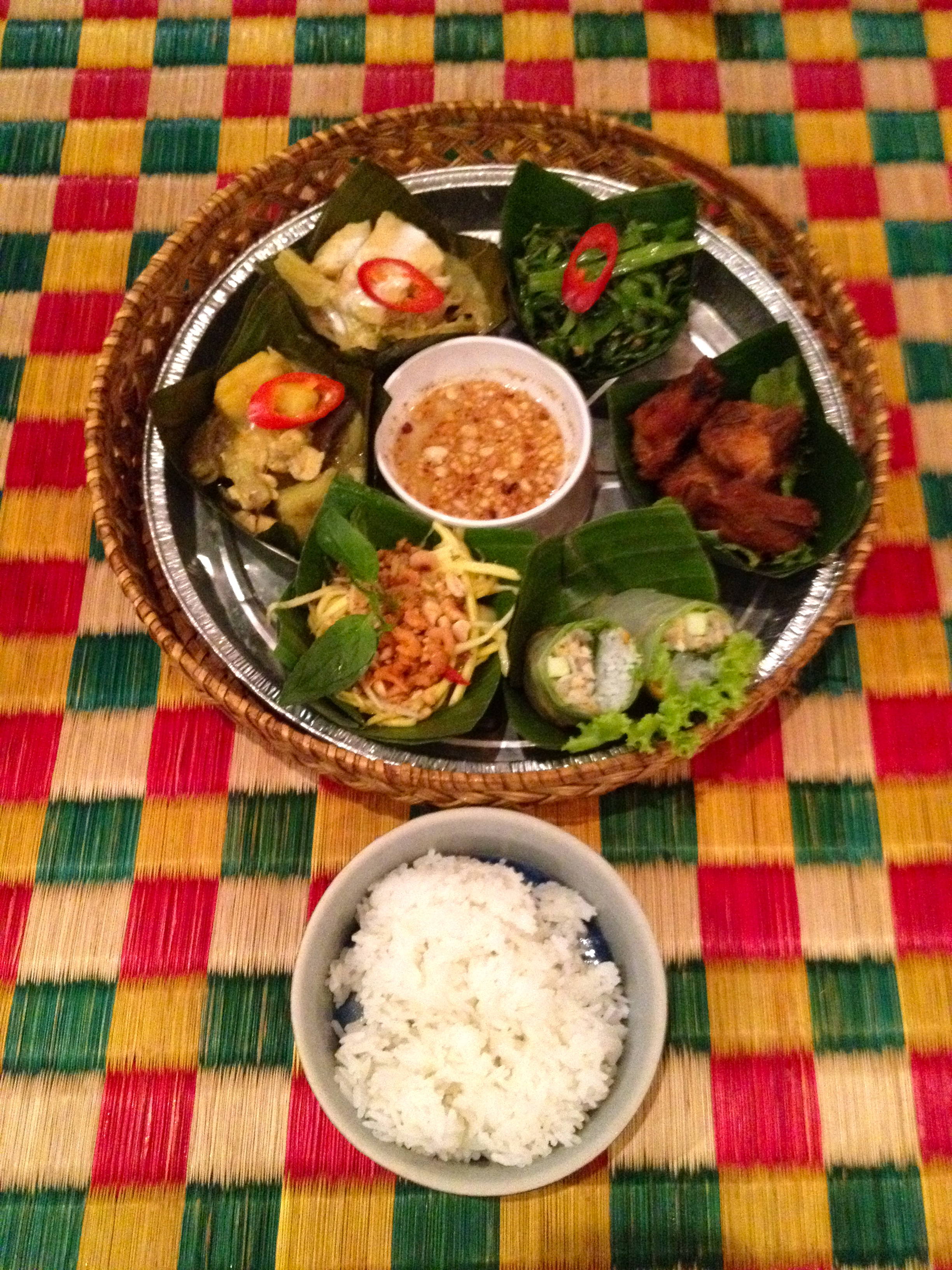 Phnom Penh, Cambodia.